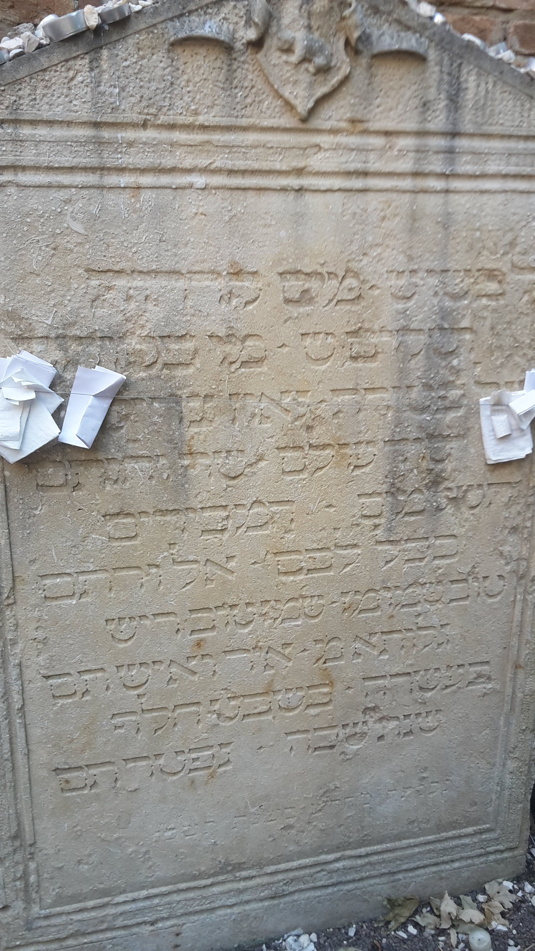 מצבת קברו של המהר"ם מפדובה